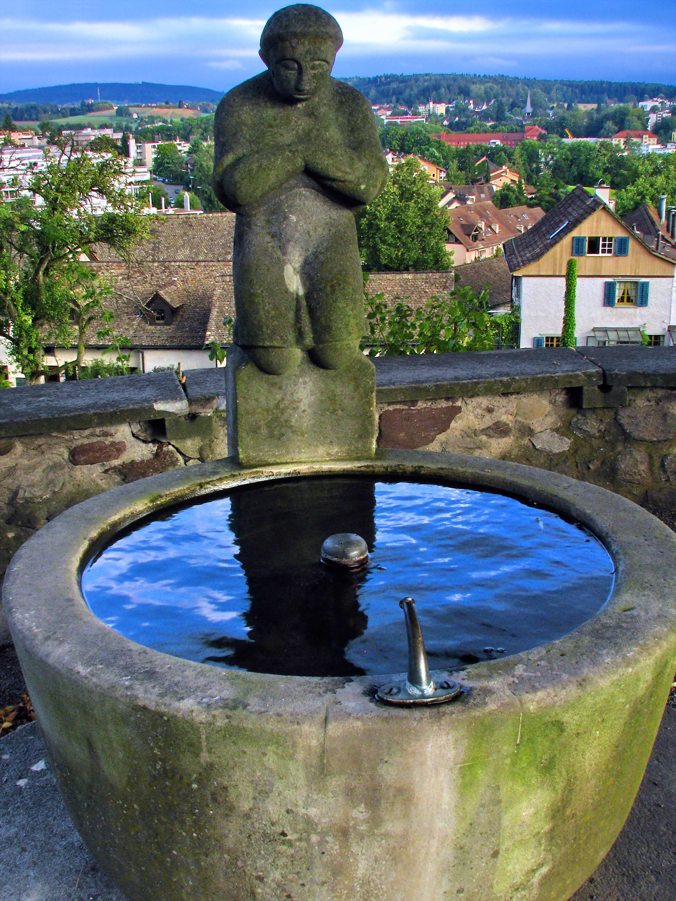 Fountain behing Alte Kirche (Old church) in Zürich-Witikon Switzerland), Zollikerberg and Pfannenstiel (to the left) in the background.